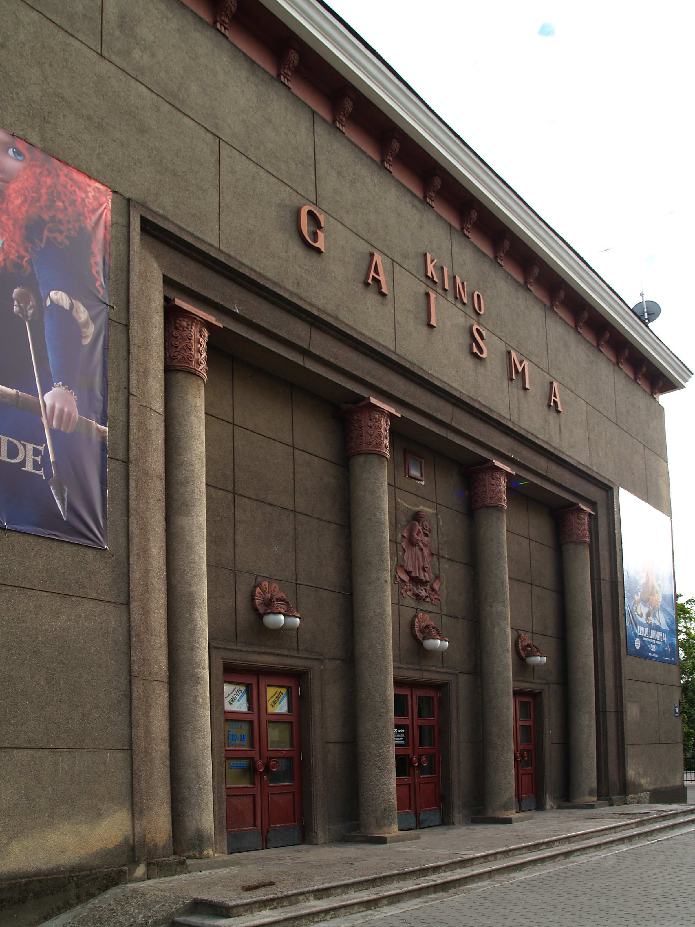 Kino Gaisma Valmieras.